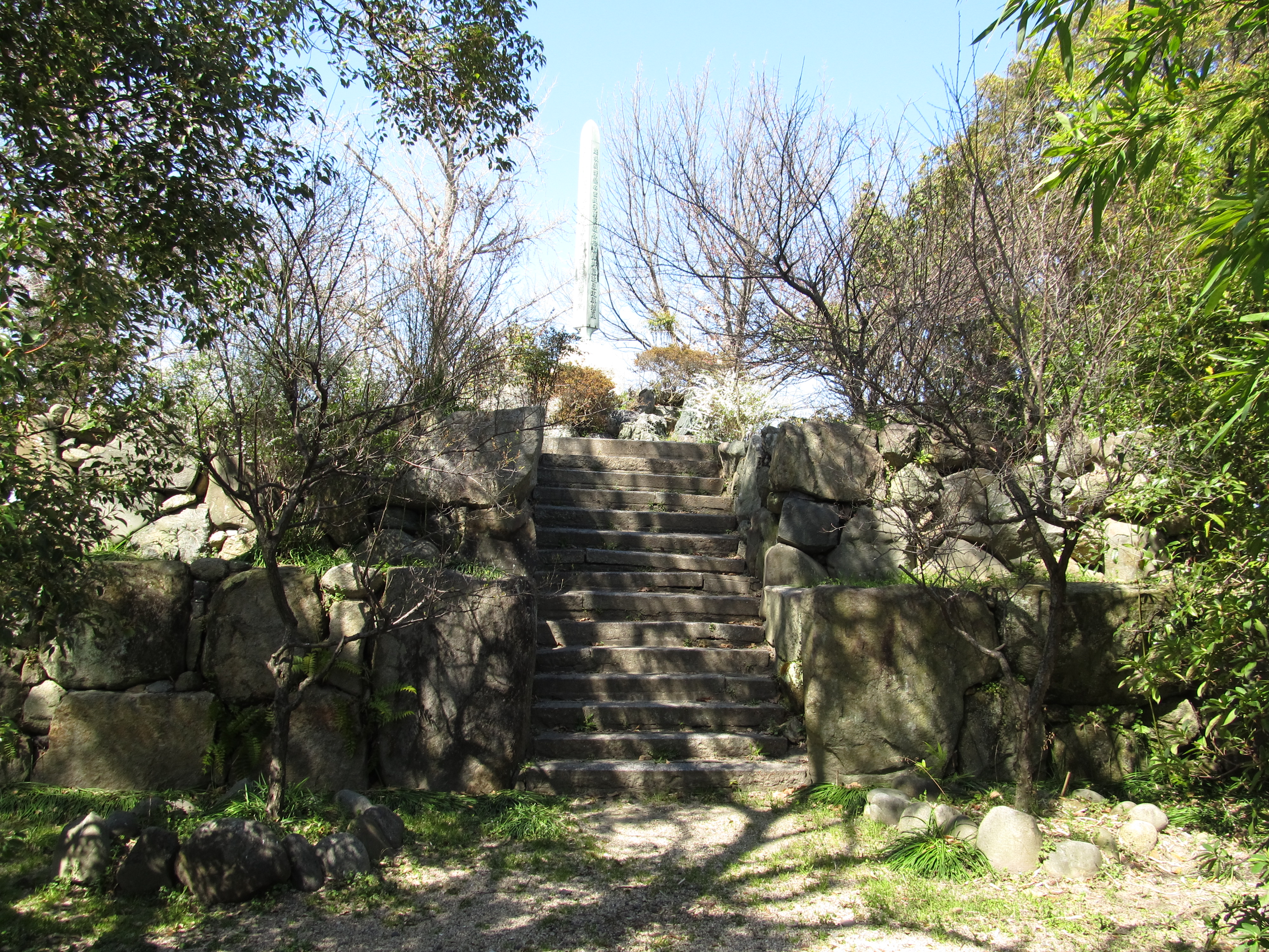 三重県桑名市にある桑名城の天守台。 天守は元禄14年に焼失して以降再建されなかった。